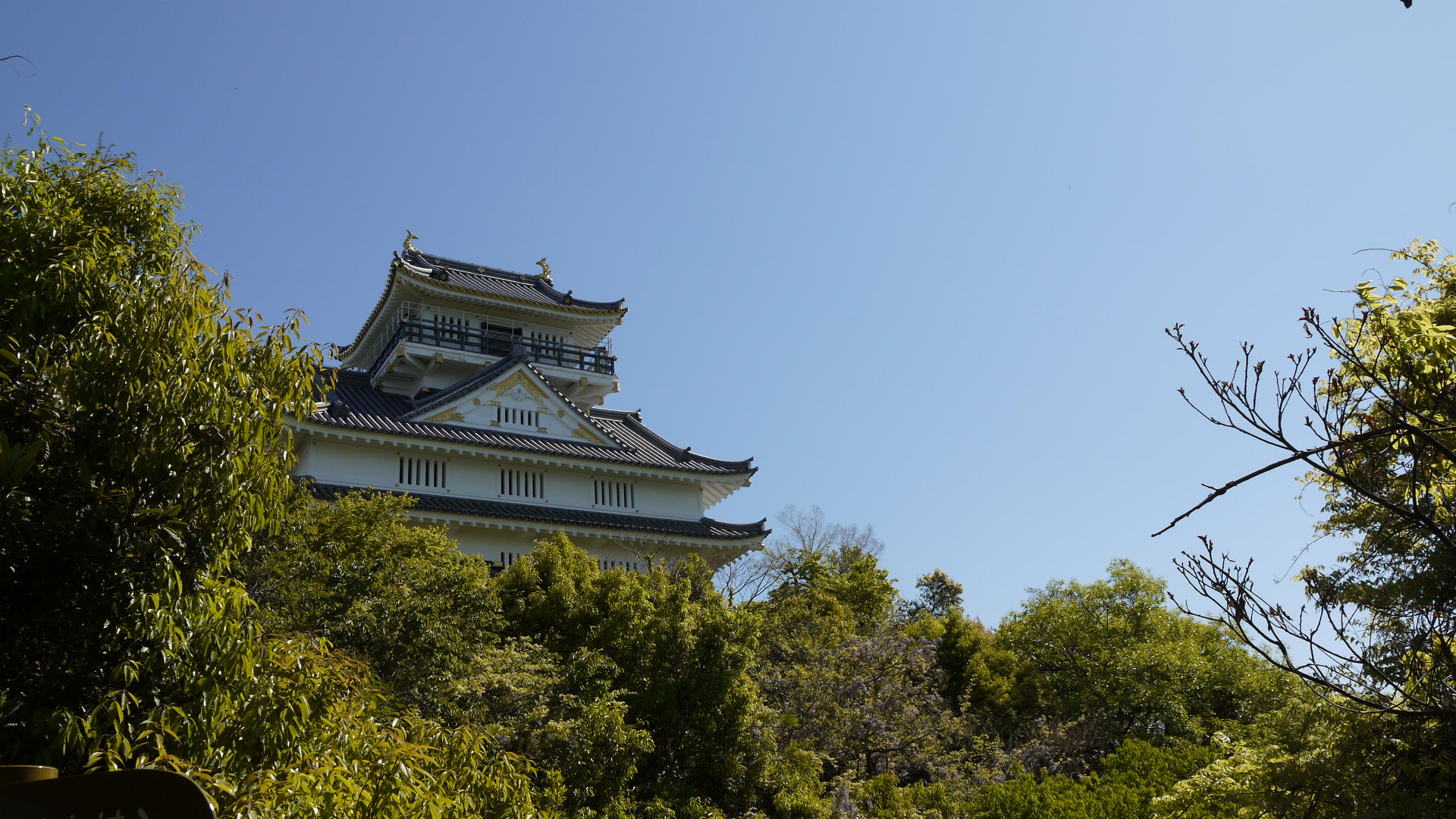 岐阜城2 Gifu Castle